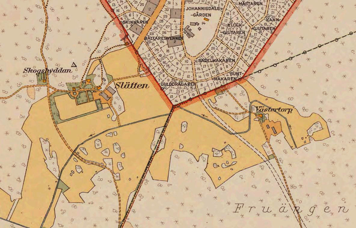 Del av Kartblad ”Fridhem” ur Stockholms stad med omnejd i 12 blad visande gårdarna Slätten, Johannisdal och Västertorp